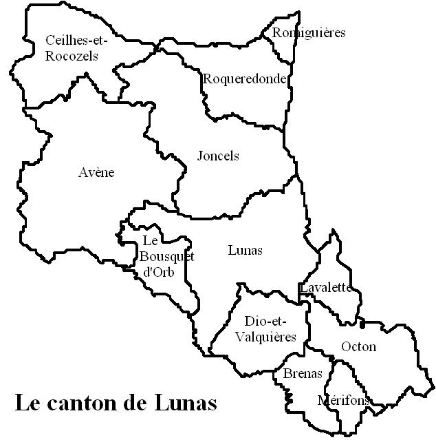 Le canton de Lunas Image personnelle